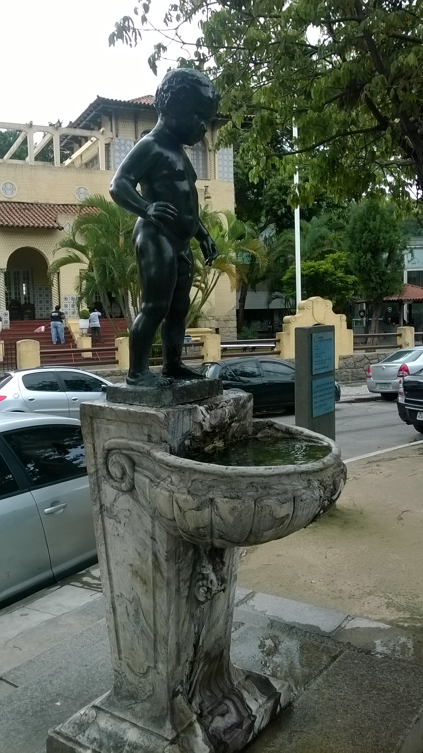 "Manequinho", estátua em bronze, Belmiro, 1911, Av. General Severiano, Botafogo, Rio de Janeiro, RJ, Brasil.